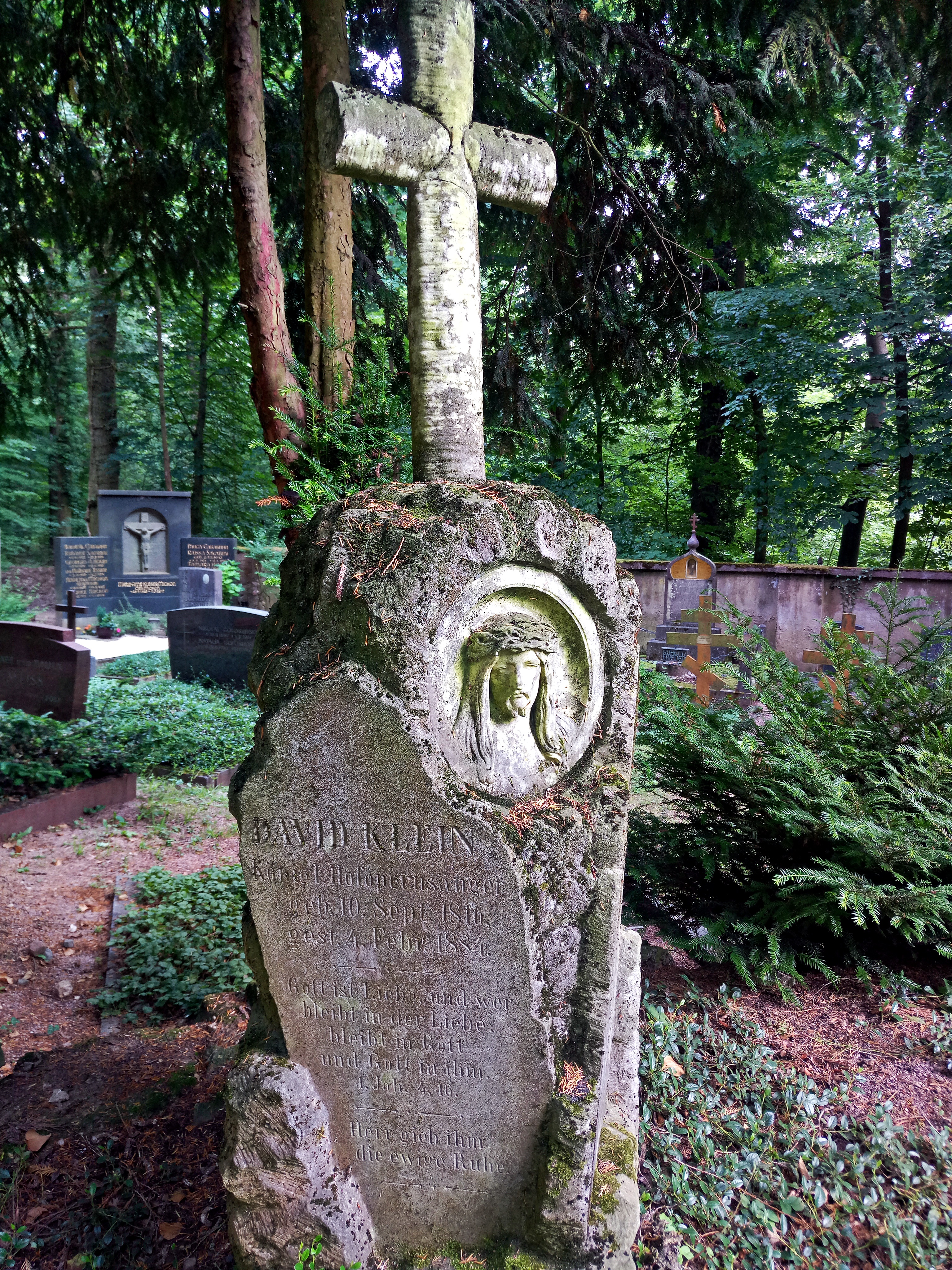 Russischer Friedhof Wiesbaden Grabmal Hofopernsänger David Klein (1816-1884)